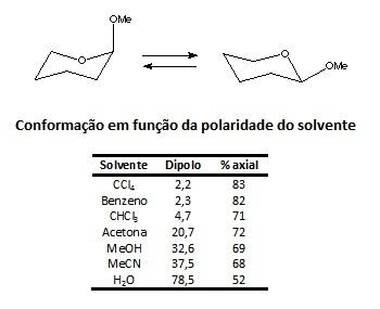 Efeito de solvente na conformação anomérica